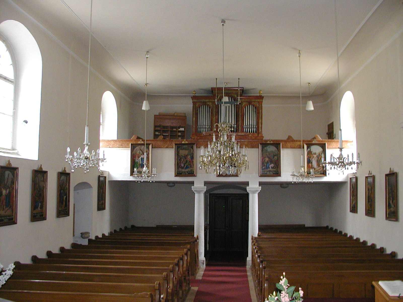 Pfarrkirche Maria Verkündigung in Goggendorf, Einblick nach Süden